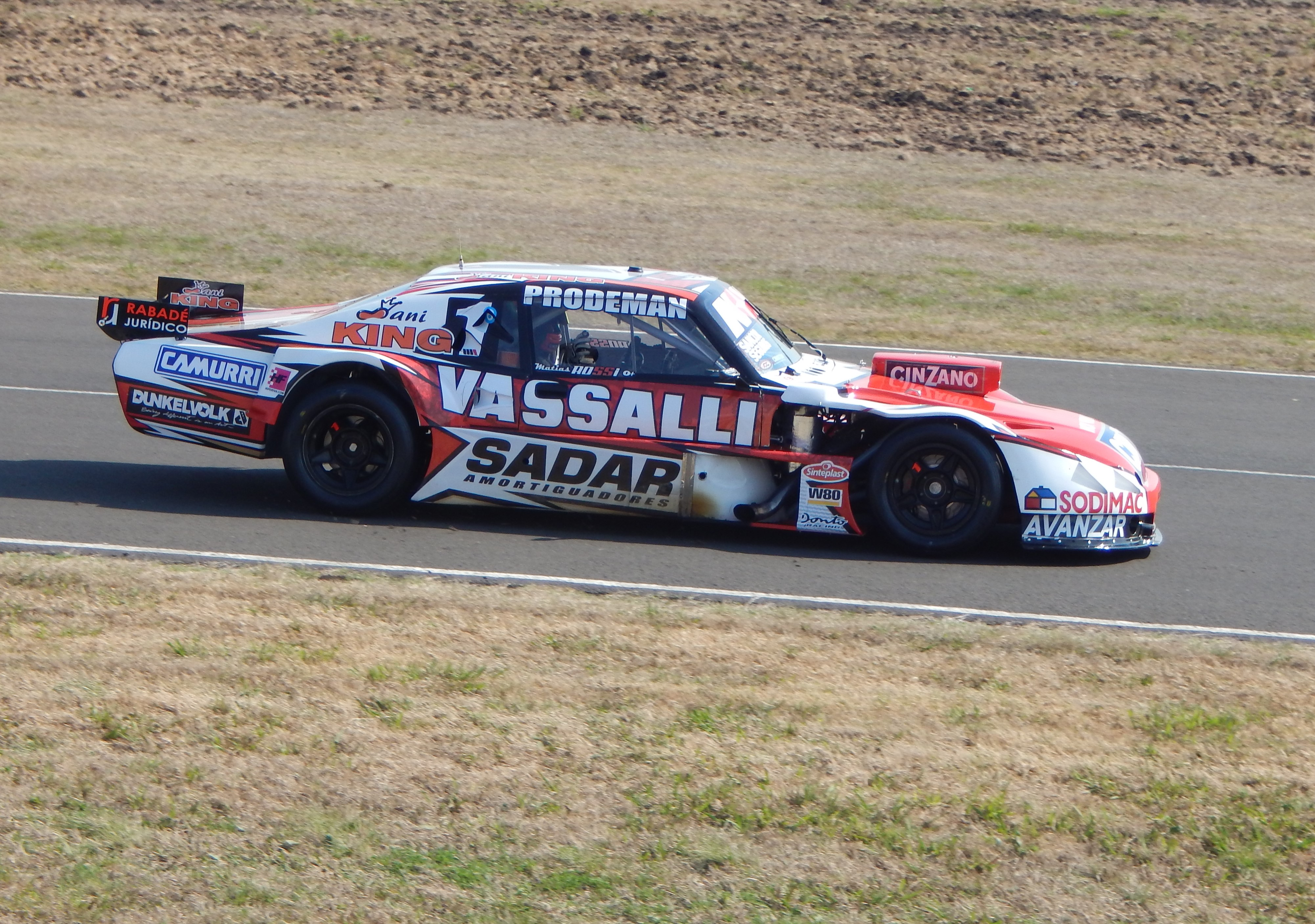 Matias Rossi 2015 Paraná